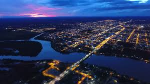 Noite em Ji-Paraná